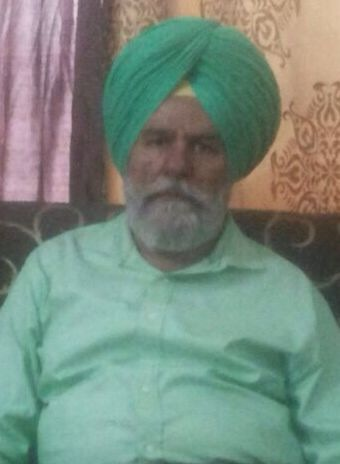 A punjabi author